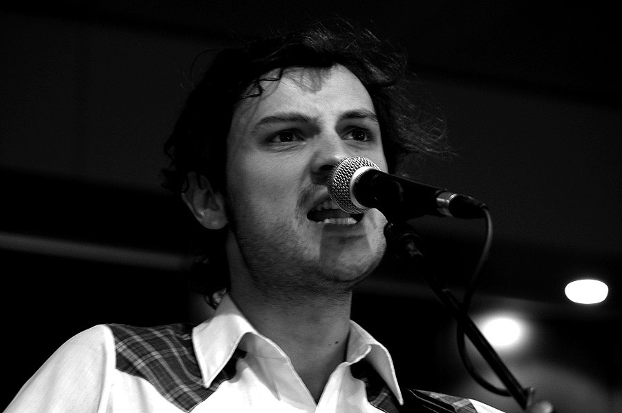 Groupe de rock My Little Cheap Dictaphone, Fnac de Louvain